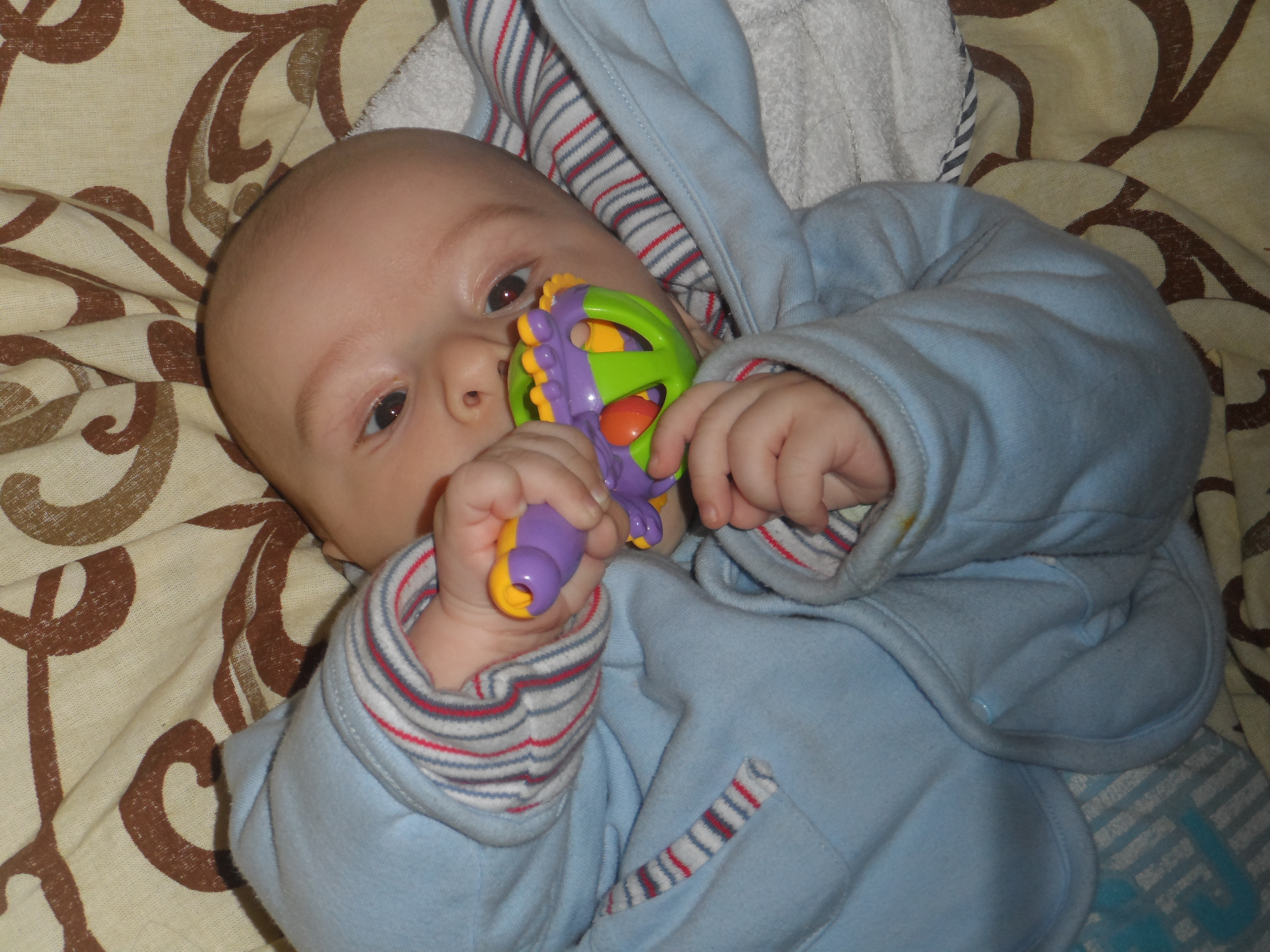 Ребёнок